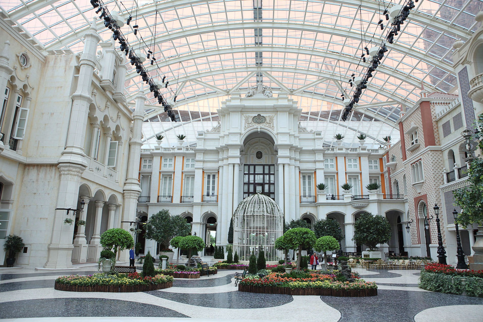 MGM Macau 參照里斯本的中央車站的設計的 MGM 米高梅天幕廣場